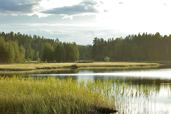 Lilla Raggsjön